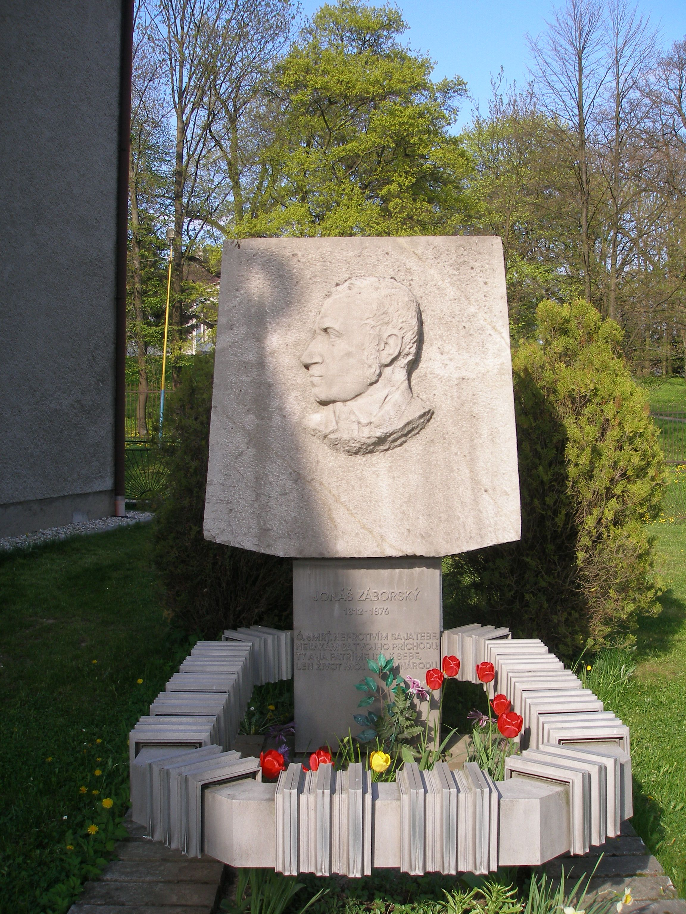 Obec Župčany okres Prešov región Šariš. Jonáš Záborský, pamätník